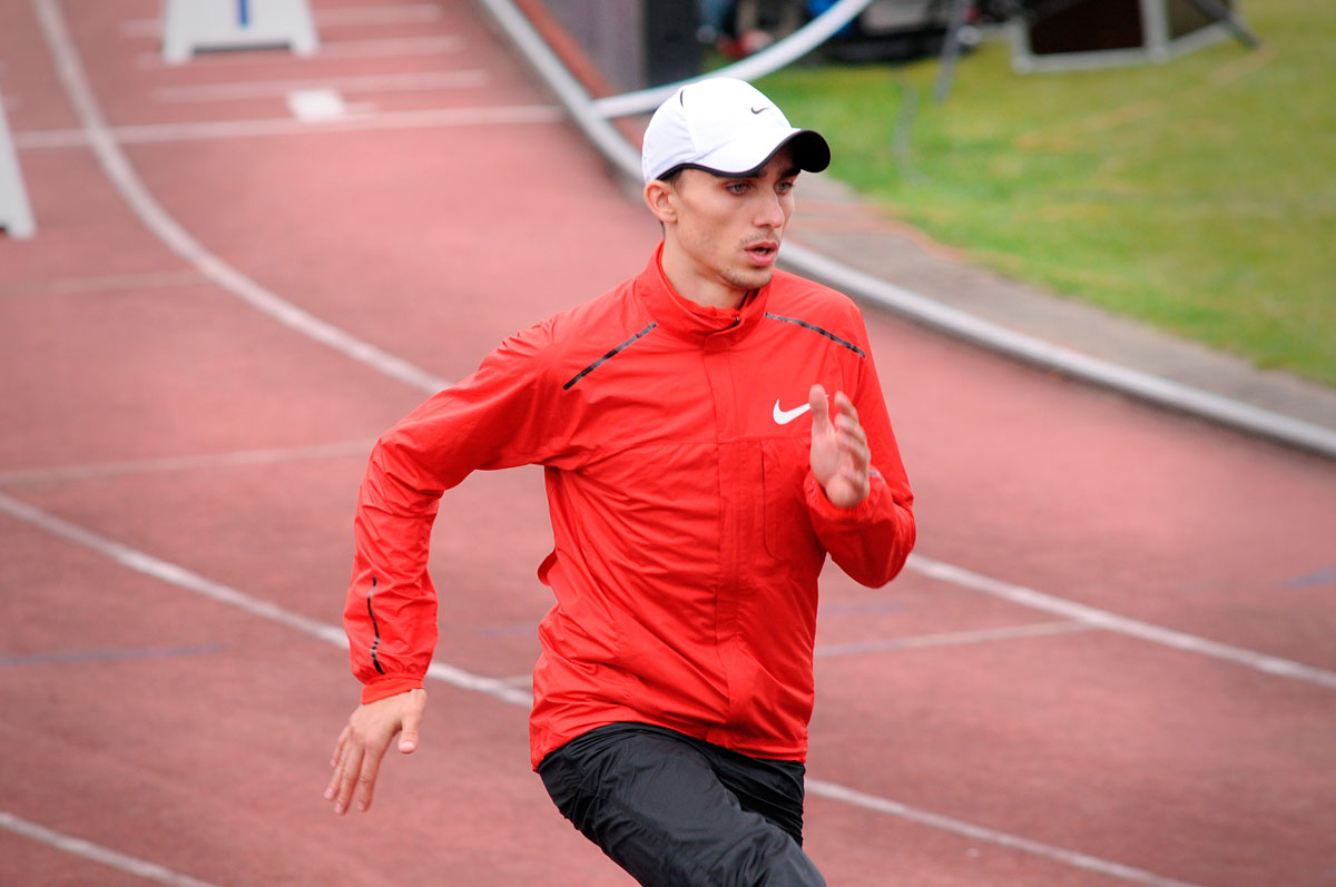 Adam Kszczot w trakcie rozgrzewki przed biegiem na 800m podczas 2 Memoriału Kamili Skolimowskiej w Warszawie.